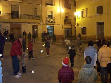 Rodant aixames a Relleu.